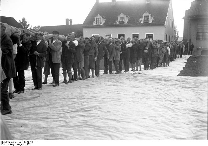 Der bekannte Höhenforscher Professor [Auguste] Piccard, bereitet sich in der Schweiz auf seinen neuen Stratosphärenflug vor ! Cirka 50 Menschen haben an der Hülle des Stratosphären-Ballons zu tragen.